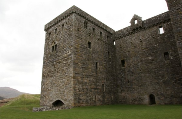 Hermitage Castle, Scotland